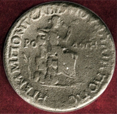 Монета на Филипопол от 150 г. с изображение на богинята на планината Родопи.